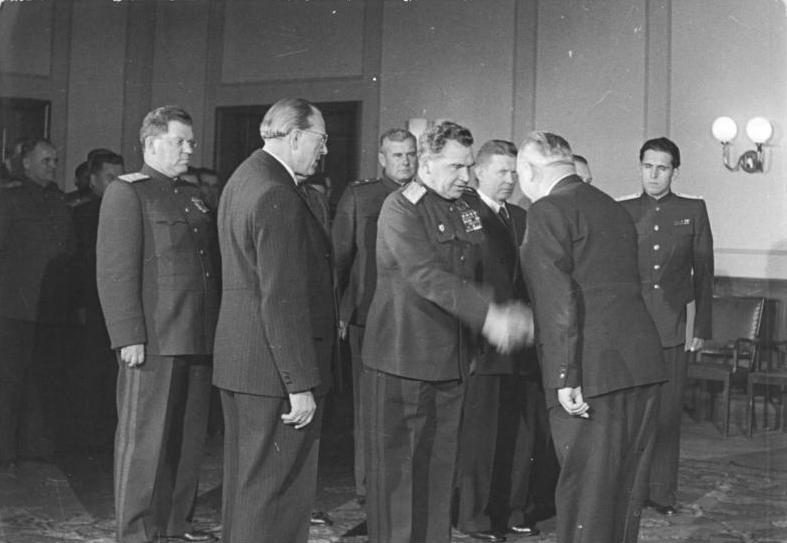 ADN-ZB/SNB Gründung der Deutschen Demokratischen Republik am 7.10.1949. Armeegeneral W.J. Tschuikow, Chef der neugeschaffenen Sowjetischen Kontrollkommission (SKK), der die Kontrolle über die Durchführung der Bestimmungen und Prinzipien des Potsdamer Abkommens obliegt, empfing am 11.11.1949 in Berlin-Karlshorst anläßlich der Auflösung der Sowjetischen Militär-Administration und der Übertragung ihrer Verwaltungsfunktionen auf die entsprechenden Dienststellen der Provisorischen Regierung der Deutschen Demokratischen Republik das Präsidium der Provisorischen Volkskammer der DDR und den Ministerpräsidenten Otto Grotewohl. UBz: Armeegeneral W.J. Tschuikow begrüßt den Minister für Justiz Max Fechner, Ministerpräsident Otto Grotewohl neben Tschuikow. 4547-49